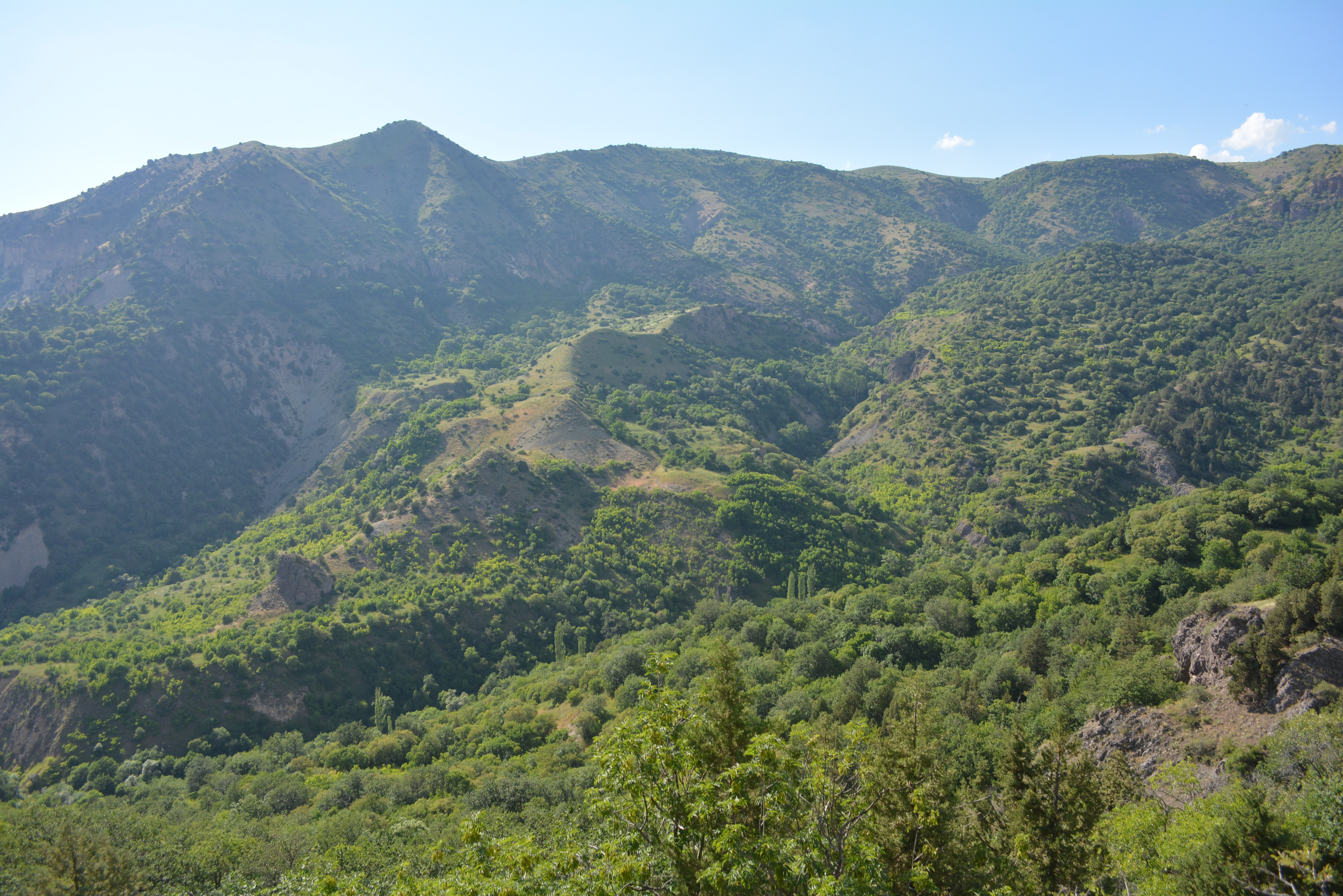 Խոսրով տեղամաս